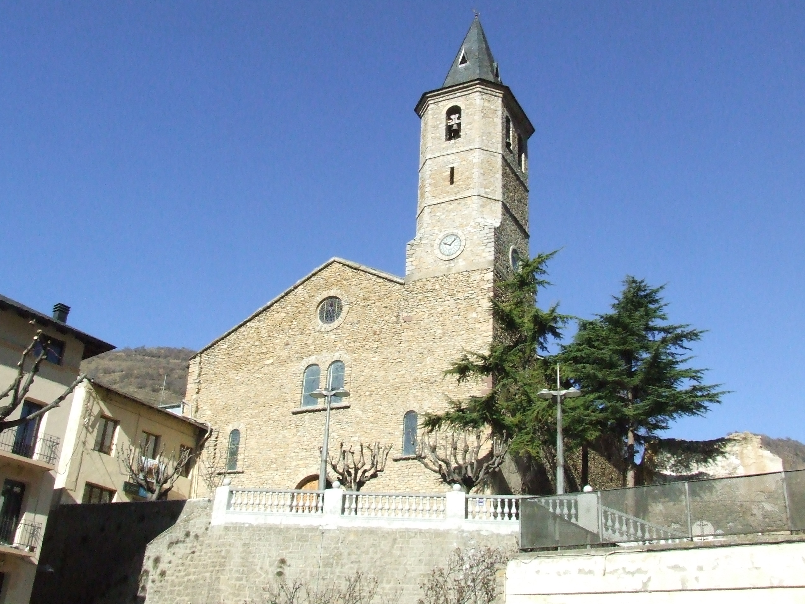 Sant Feliu de Sort (Pallars Sobirà)